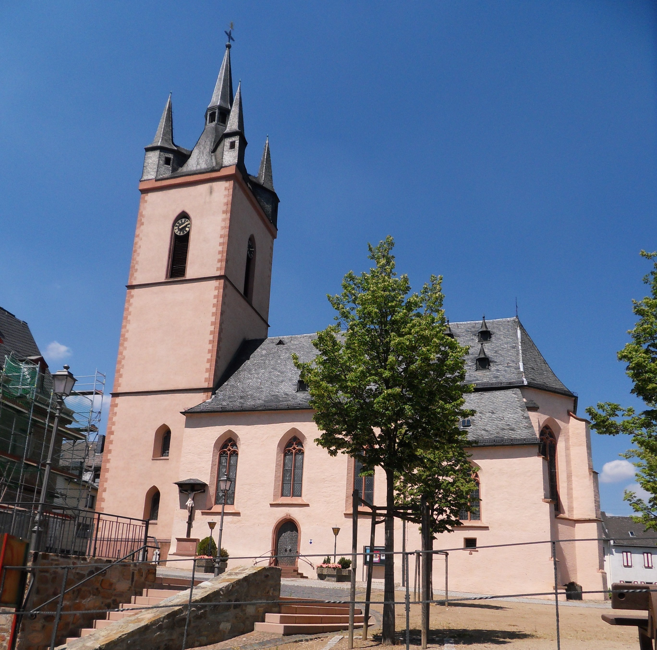 Katholische Pfarrkirche St. Antonius in Rauenthal, Blick von Süden